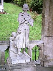 von oder nach Marie-Christine d'Orléans: Standbild der betenden Jeanne d'Arc französisch Jeanne d'Arc priant (Original von 1837 in Versailles, Musée national), Frankreich, Domrémy-la-Pucelle, Basilique du Bois Chenu Fotograf: Francis MONTIGNON Image:Jeanne d'arc 2.jpg